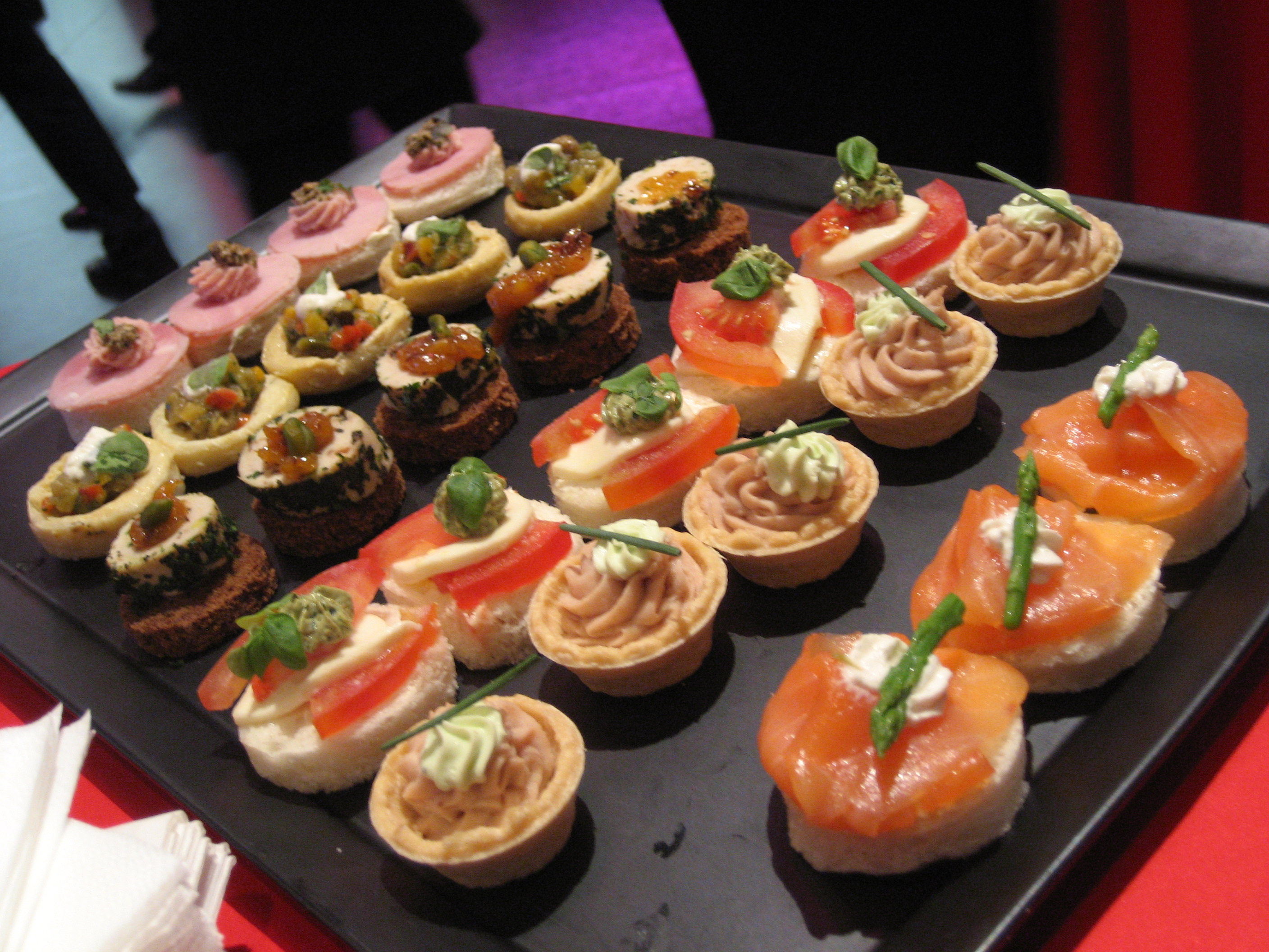 Das Apéro-Gebäck steht in Reih und Glied.